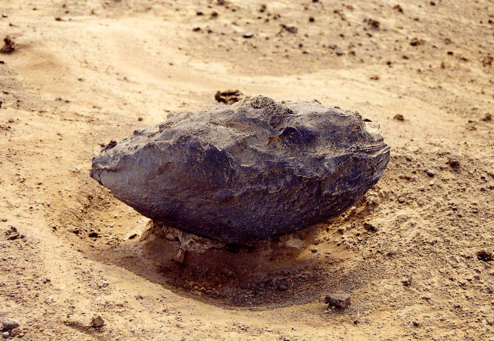 Fusiform lava bomb. Capelinhos Vulcano, Faial Island, Azores.